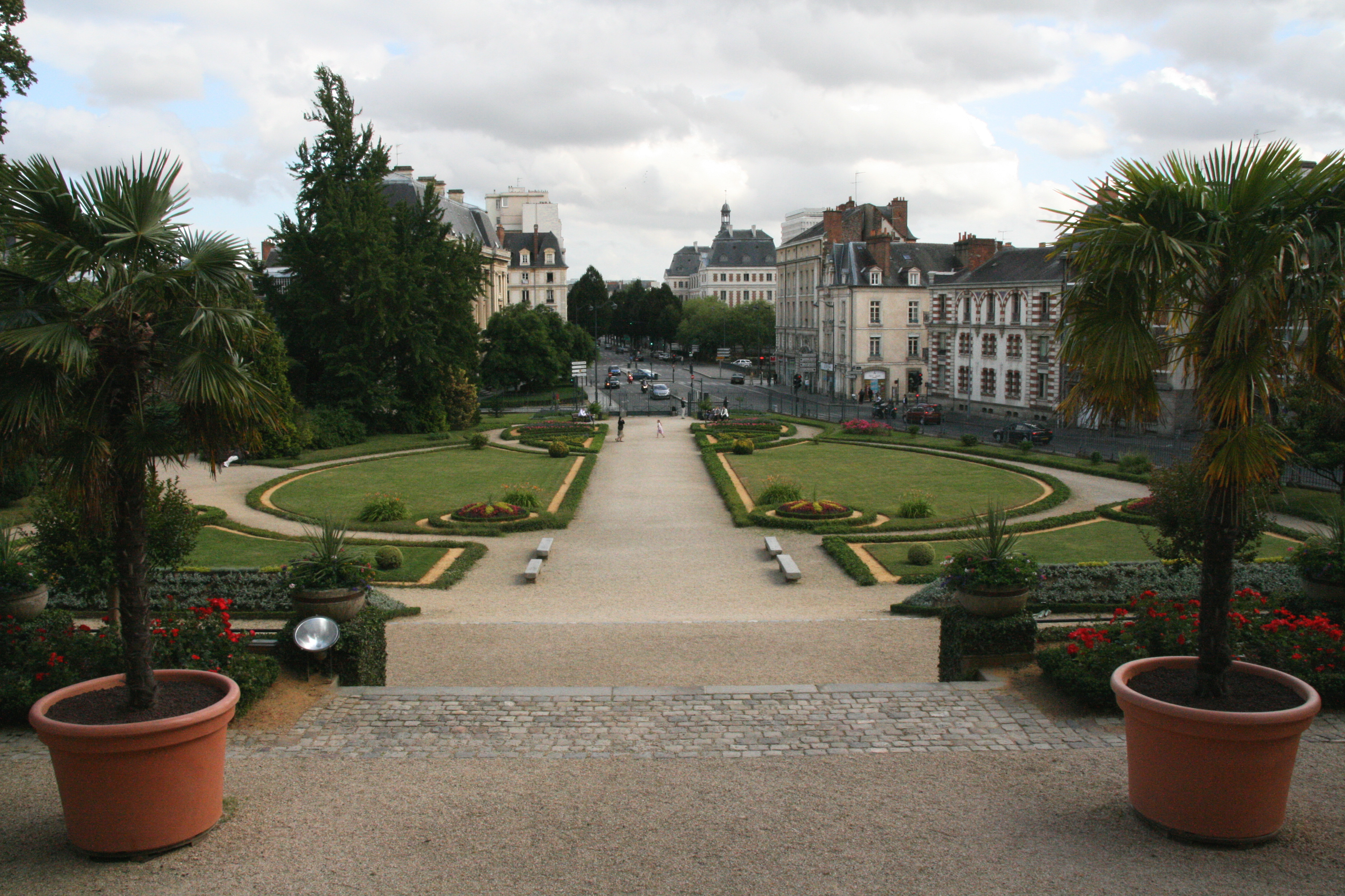 Jardins Saint-Georges, à Rennes.